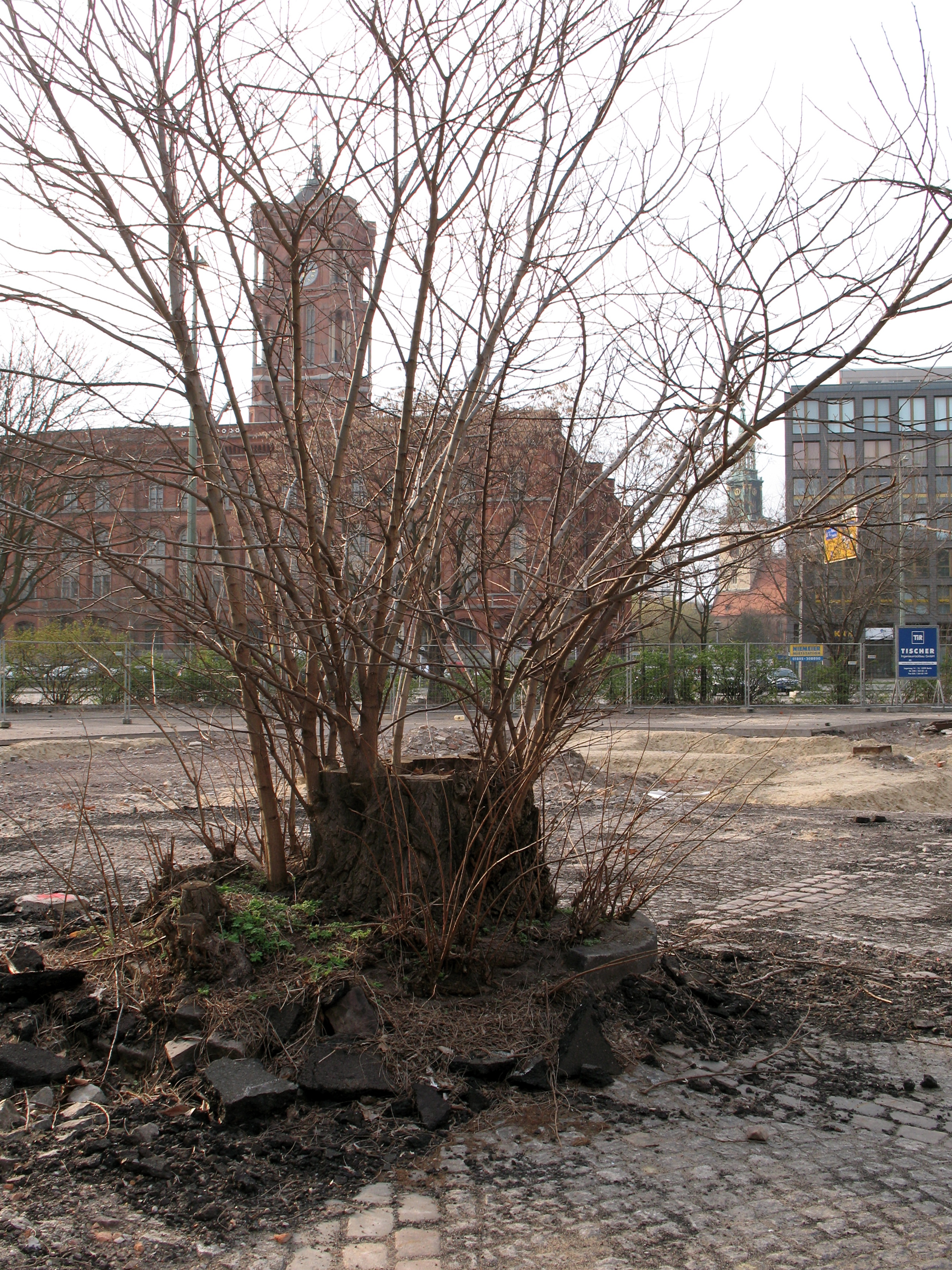 Großer Jüdenhof 2011, Reste der Akazie die 1938 gepflanzt worden ist und Steinpflaster-Muster sind zu erkennen sowie ein Rest der alten Bordsteinkante der ersten Gaslaterne im Zentrum des Hofes.